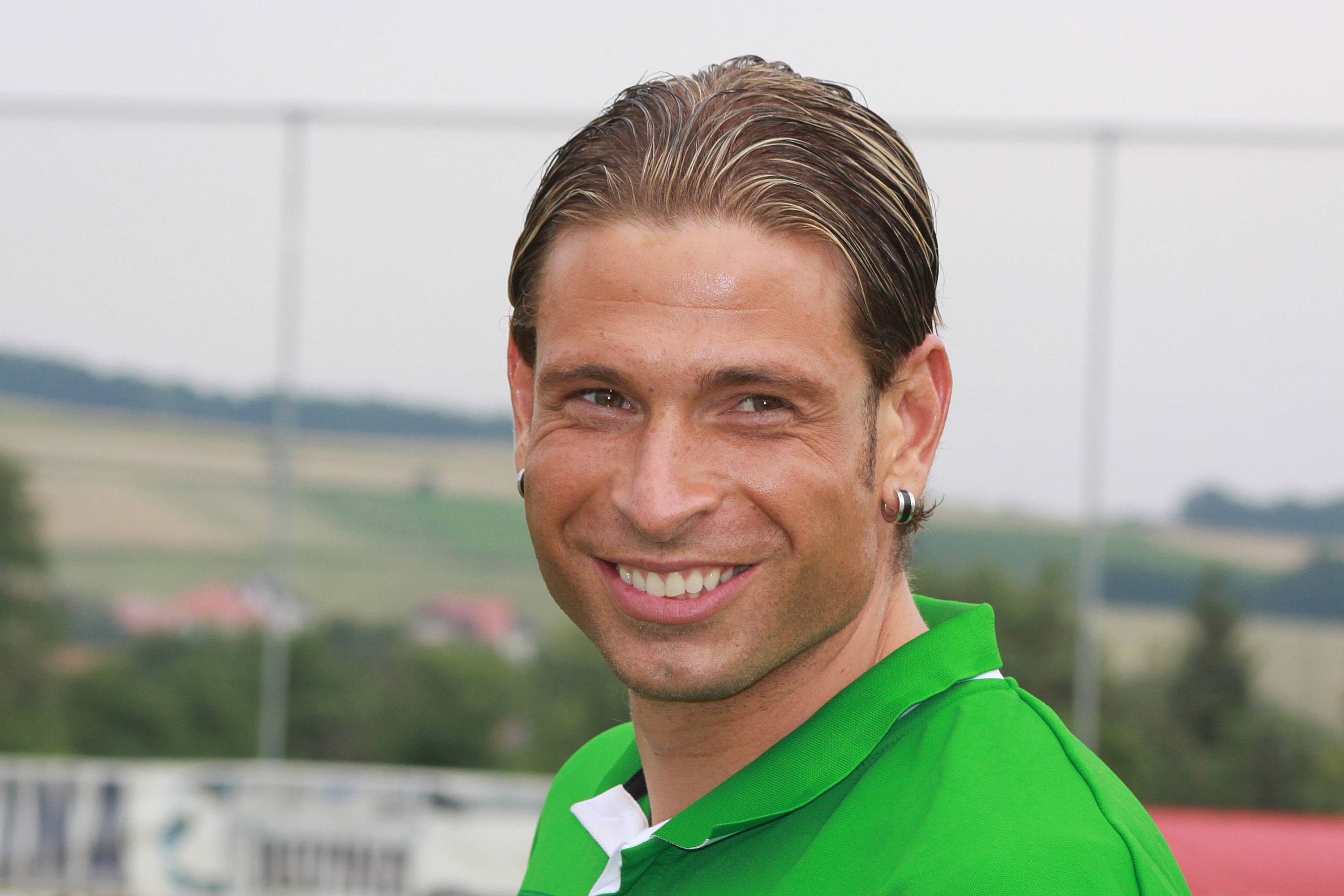 Tim Wiese - SV Werder Bremen (2)